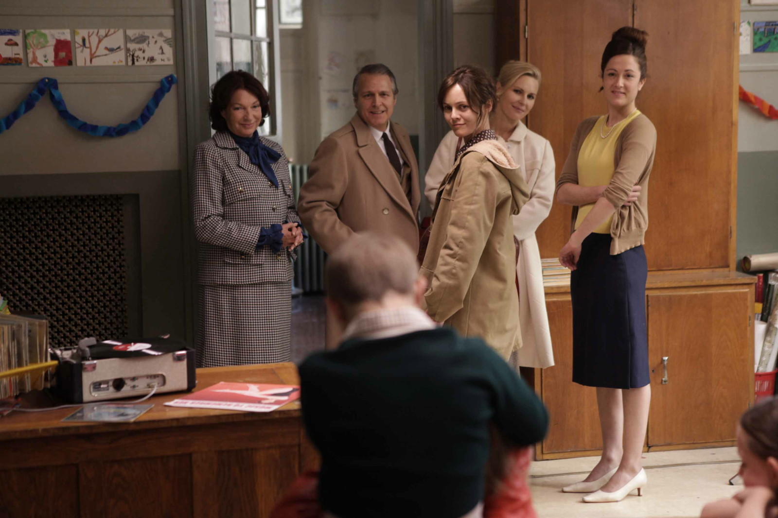 Photo de tournage du film Café de Flore avec Vanessa Paradis, Manon Balthazard, Caroline Bal, Claire Vernet, Nicolas Marié